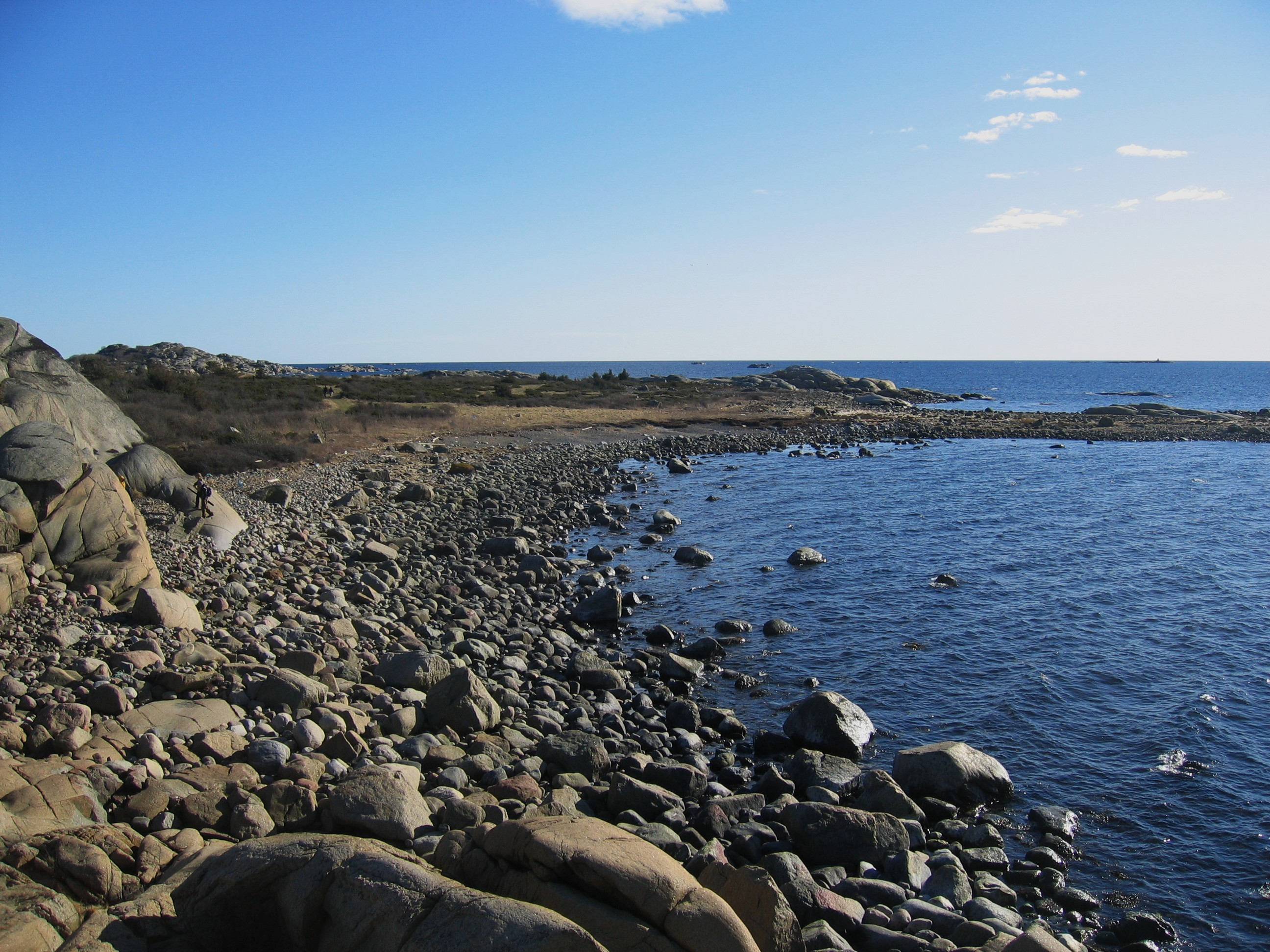 Tjøme, Moutmarka